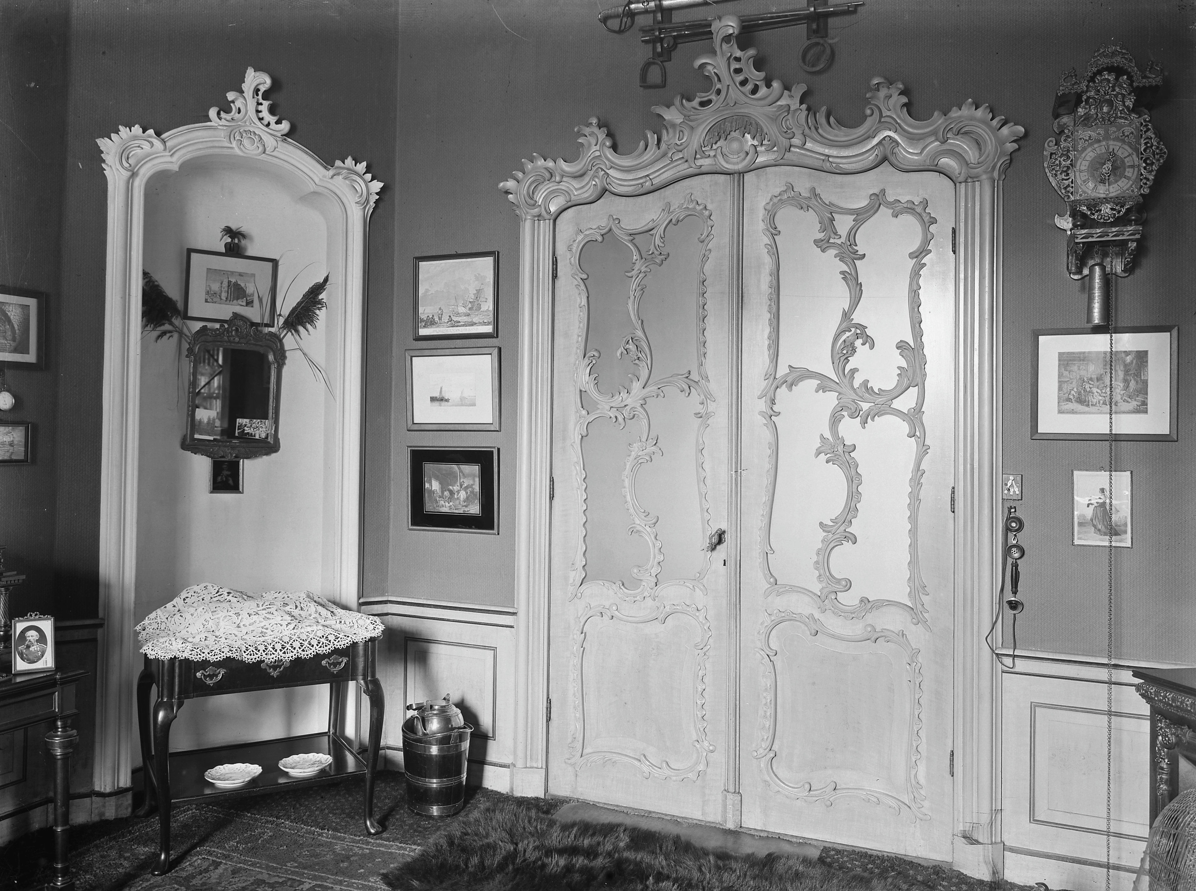 Kasteel Enghuizen: Interieur, dubbele deur met snijwerk